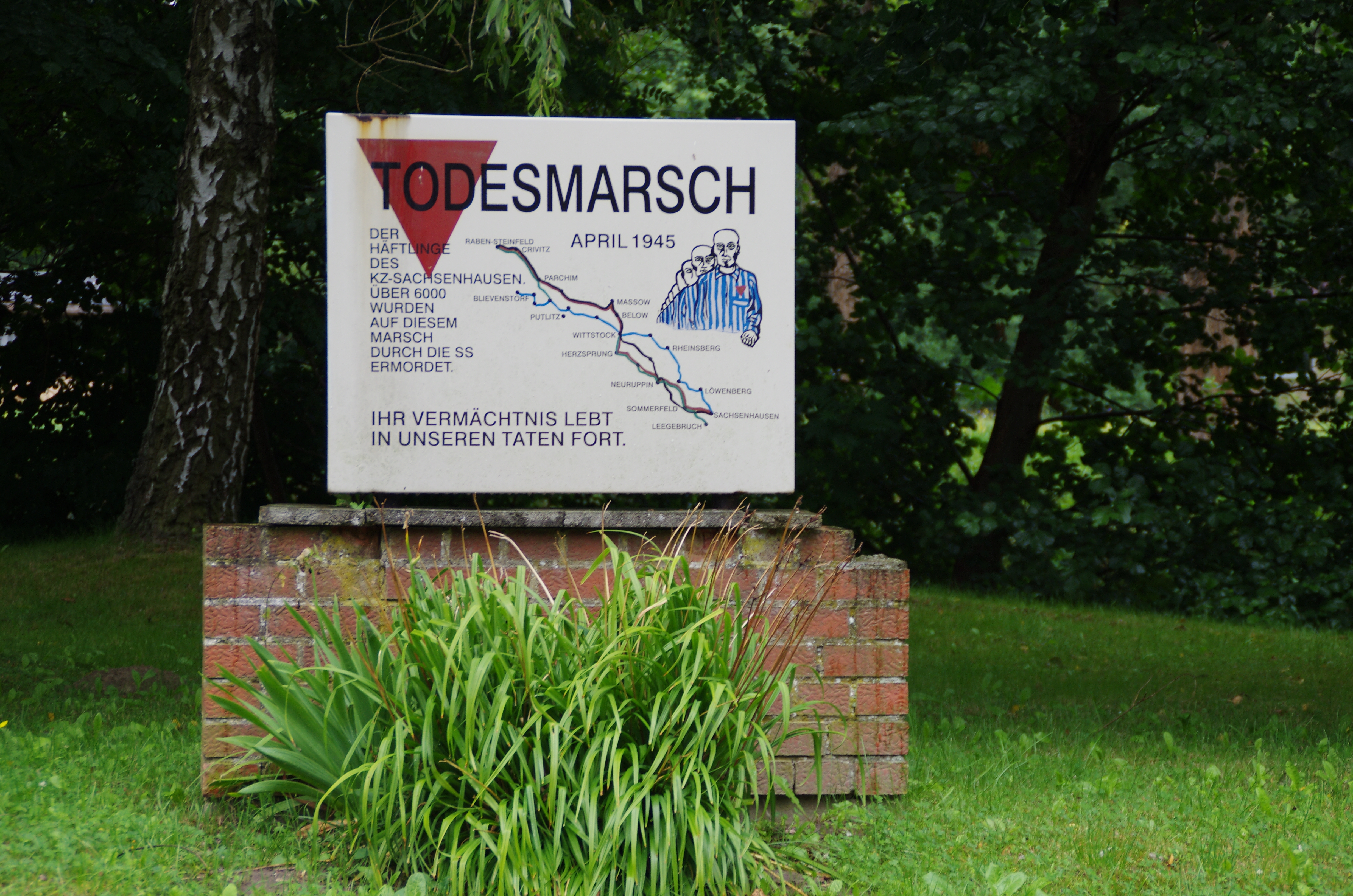 Lindow (Mark) in Brandenburg. Das Denkmal für den Todesmarsch in Klosterheide steht unter Denkmalschutz.